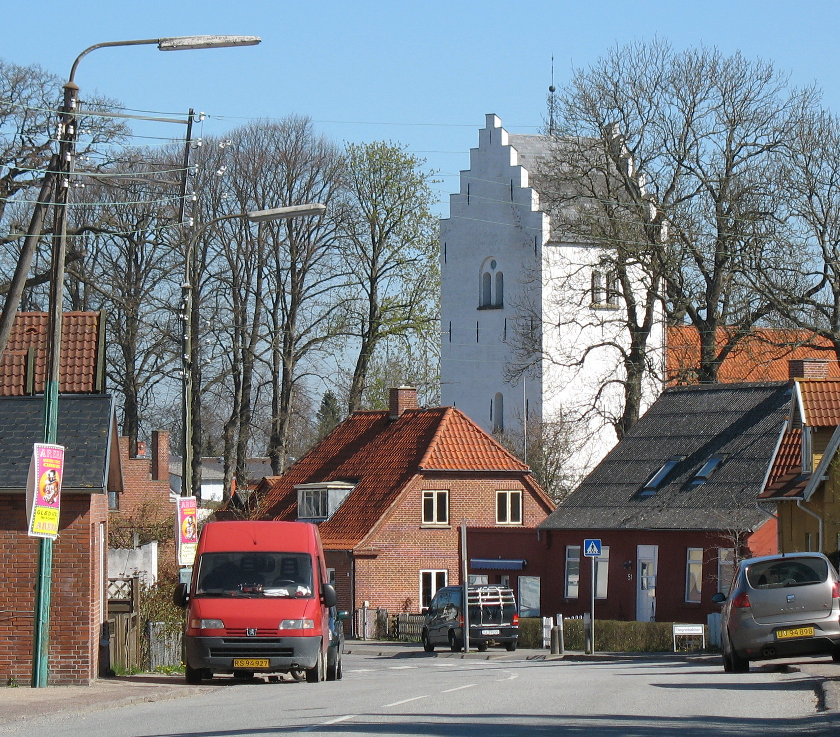 Gadeparti fra Skibby